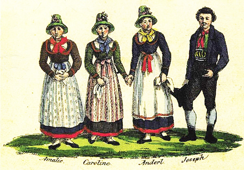 Nicht authentische Darstellung der Geschwister Strasser auf einem Noten-Deckblatt von 1883